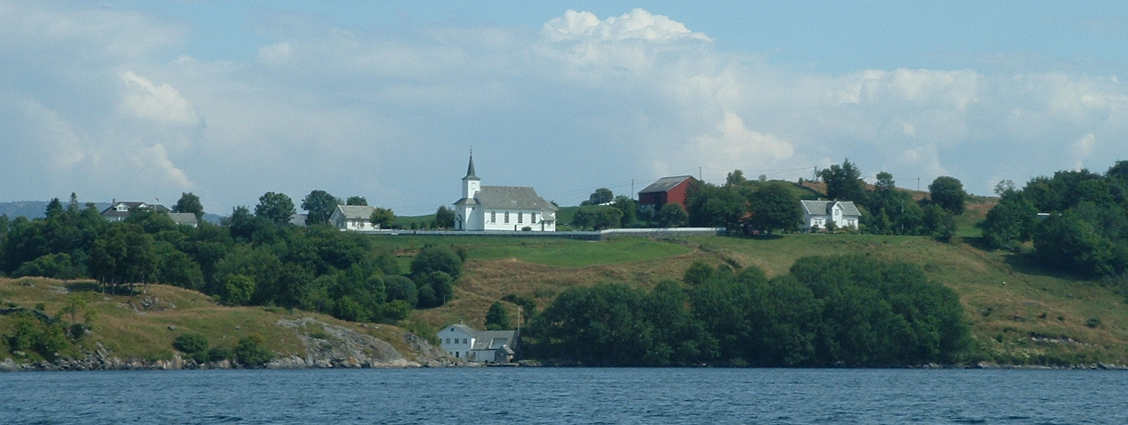 Øya Lygra sett i frå vest